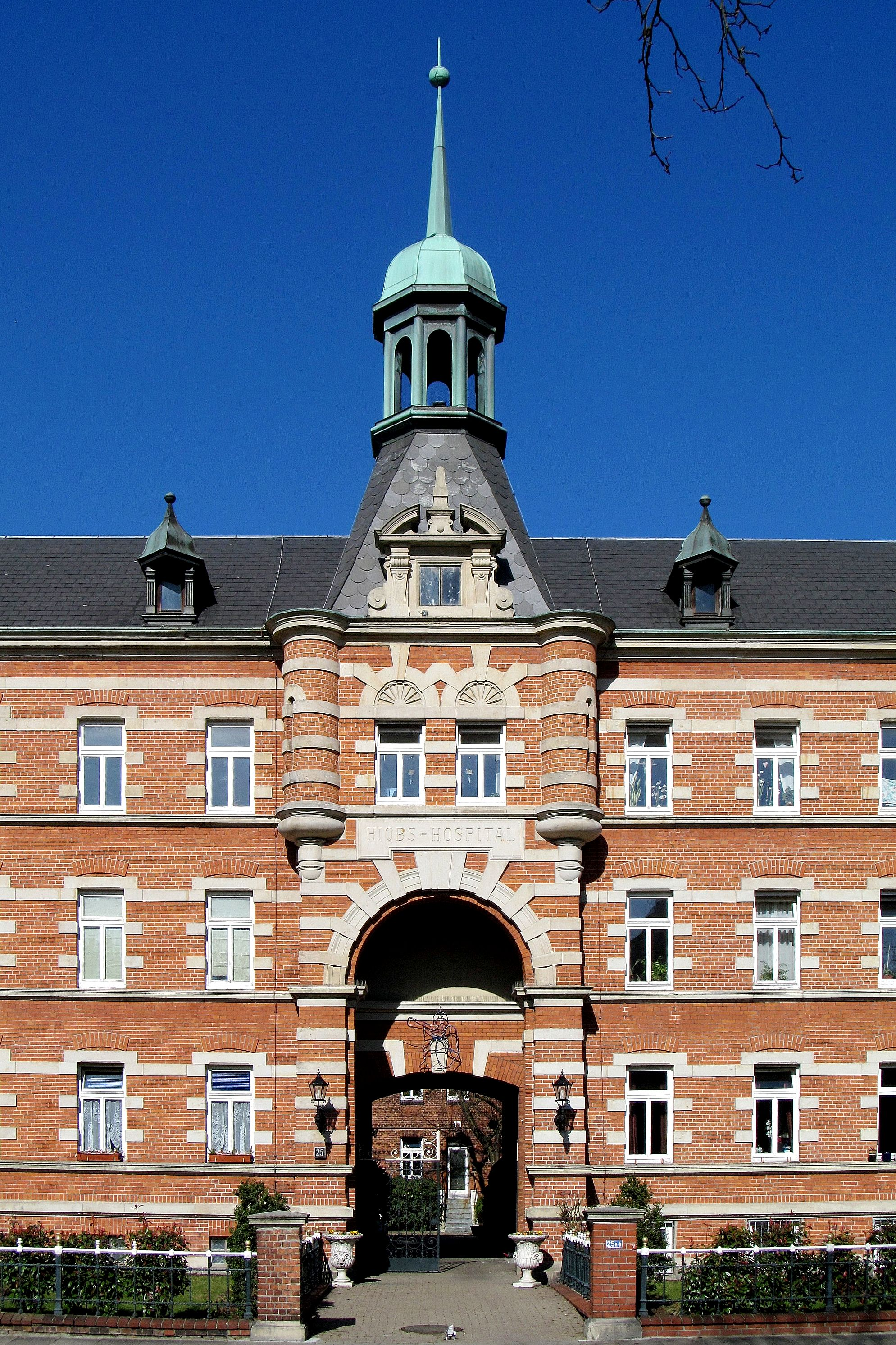 Hiobshospital, erbaut 1883-84 This is a photograph of an architectural monument.